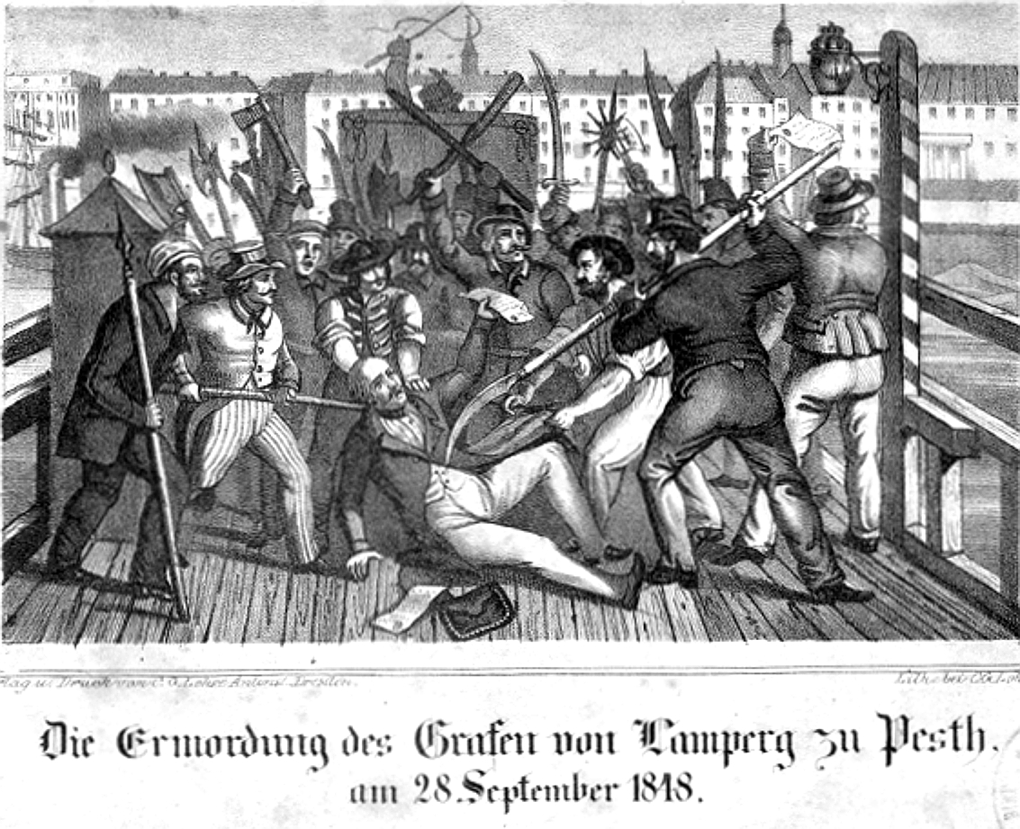 Die Ermordung des königlichen Kommissärs Franz Philipp Graf von Lamberg auf der Pester Brücke